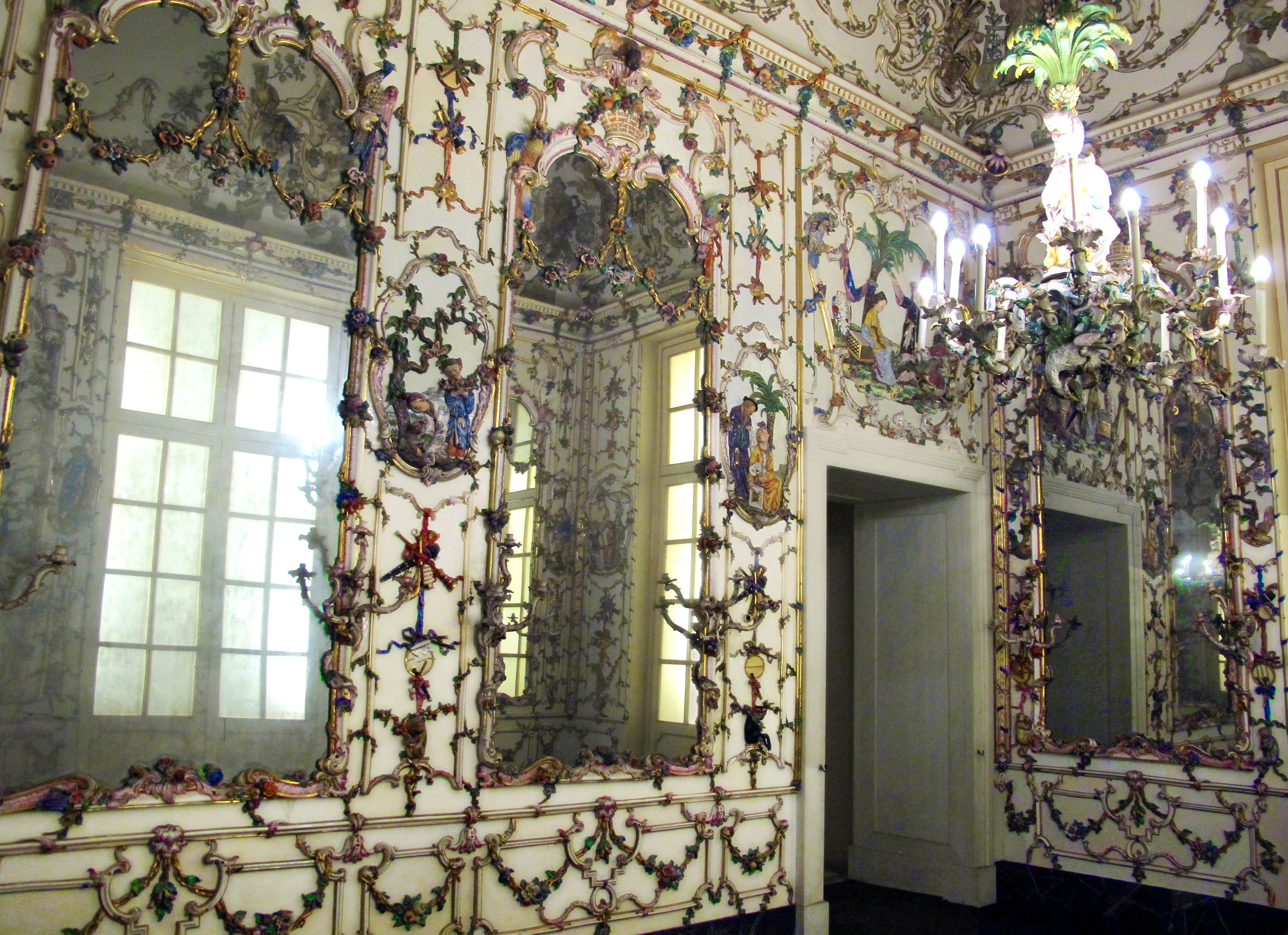 Appartamento Reale (Museo di Capodimonte)